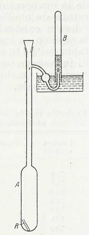 Figura que representa el procedimiento para la determinación de densidades de vapor creado por Víctor Meyer